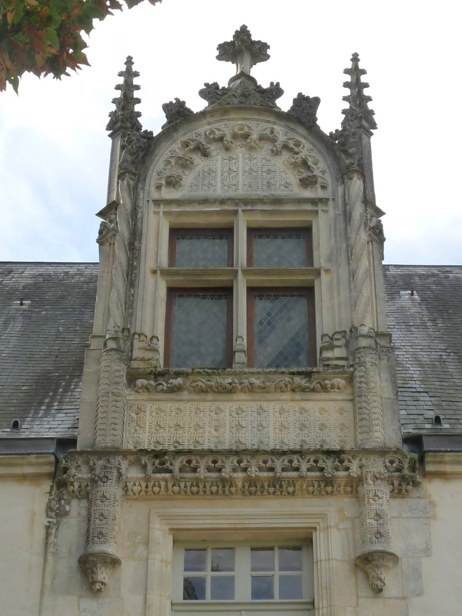 Lucarne "Gothique flamboyant" — Château de Beaulon, St-Dizant-du-Gua, Charente-Maritime, France.